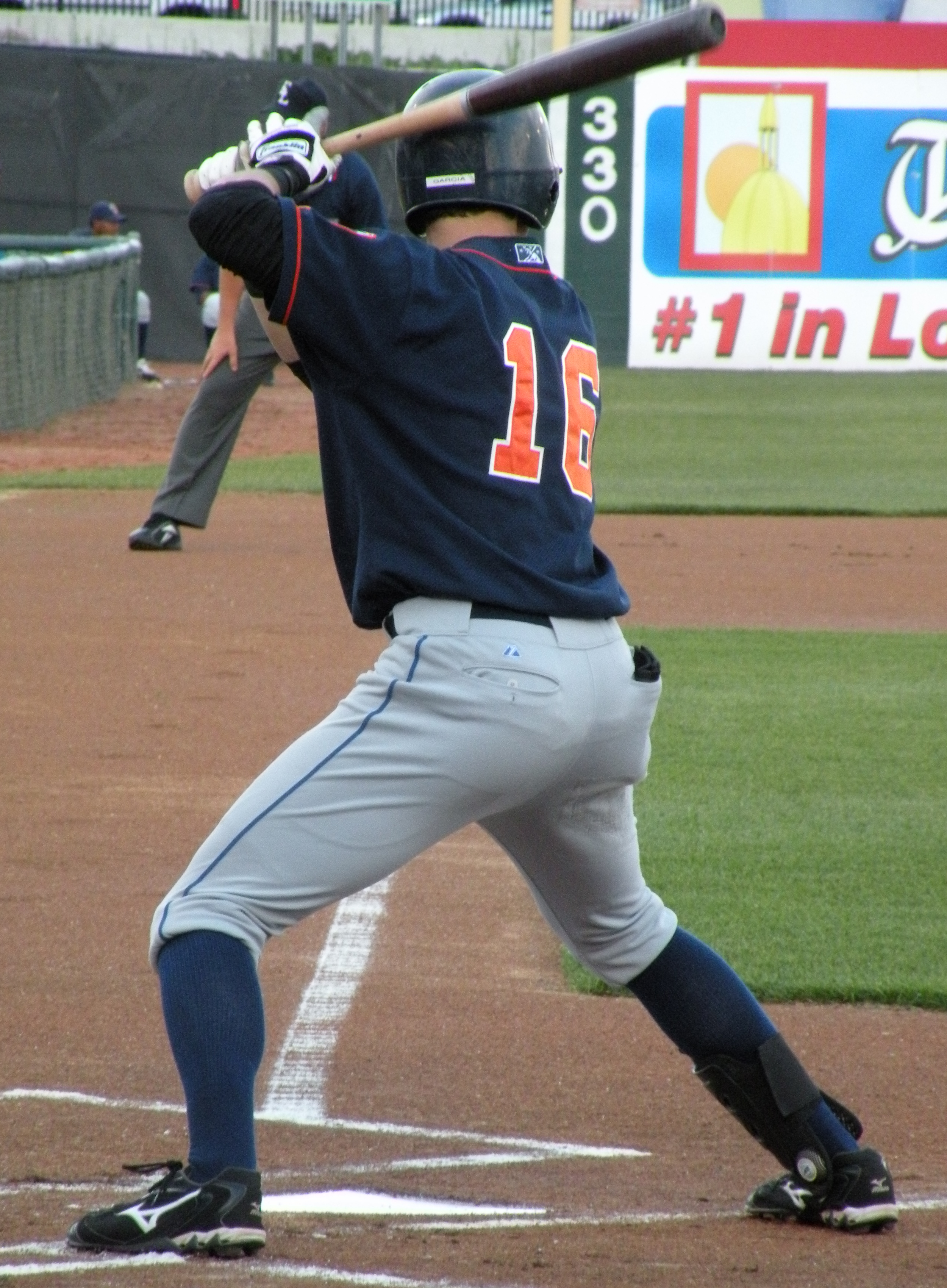 Emmanuel Garcia